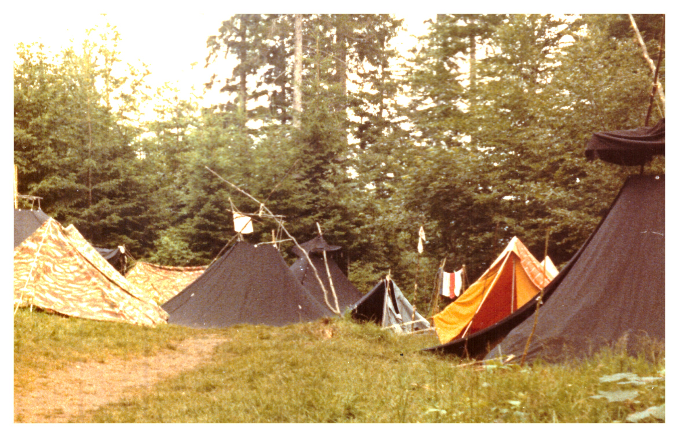 Evangelische Jungenschaft. Pfingstlager der Evangelischen Jungenschaft Grenzland (ejg) 1967 bei Jestetten-Altenburg.